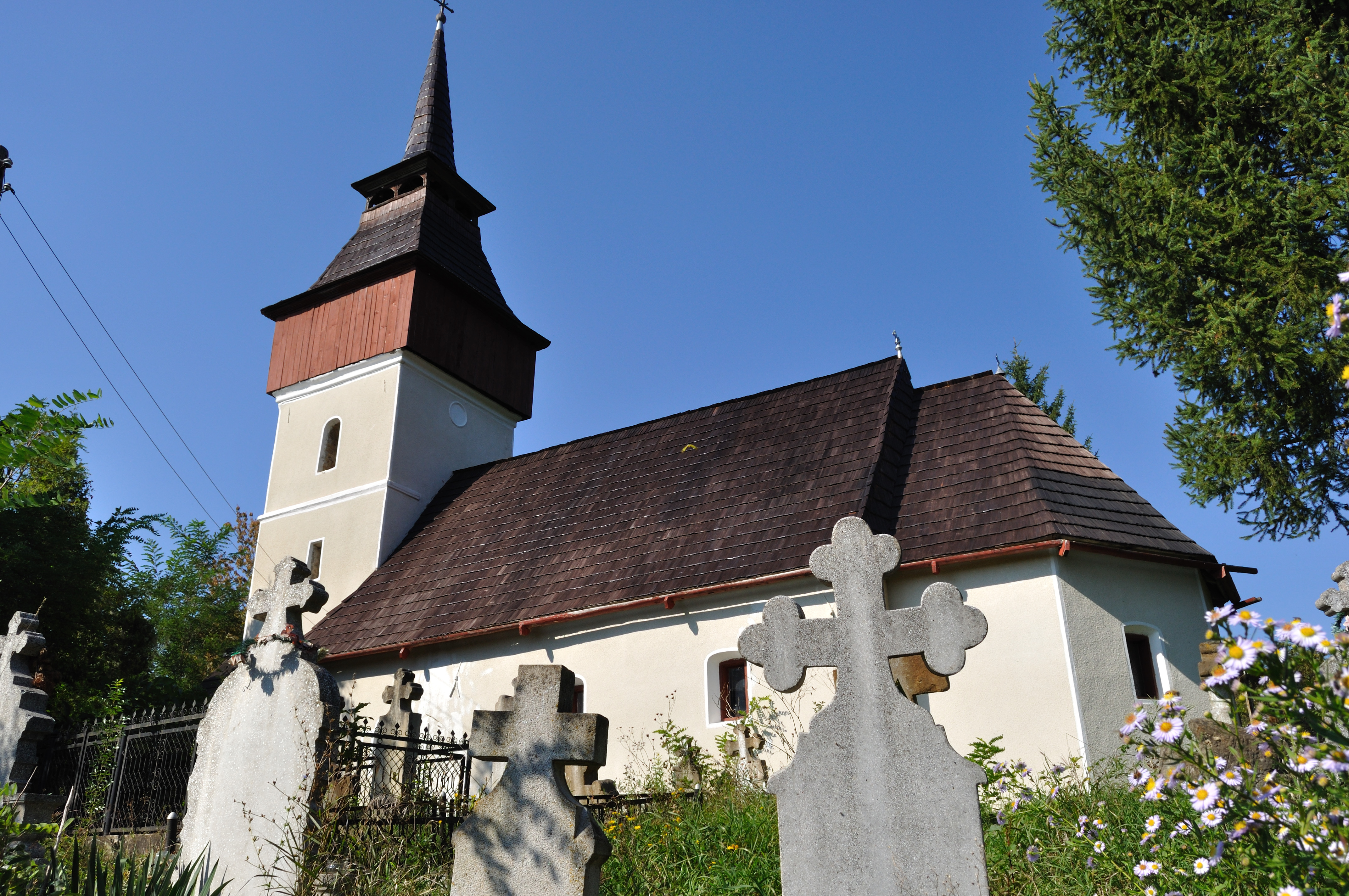 Bozeș, Hunedoara